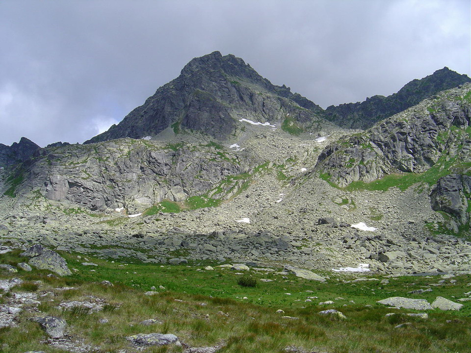 Strbsky stit in Mlynicka dolina